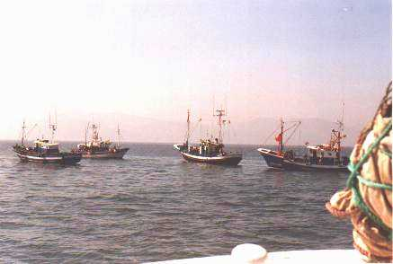 Barcos pertenecientes a la flota pesquera de bajura del País Vasco (España) pescando verdel (caballa).